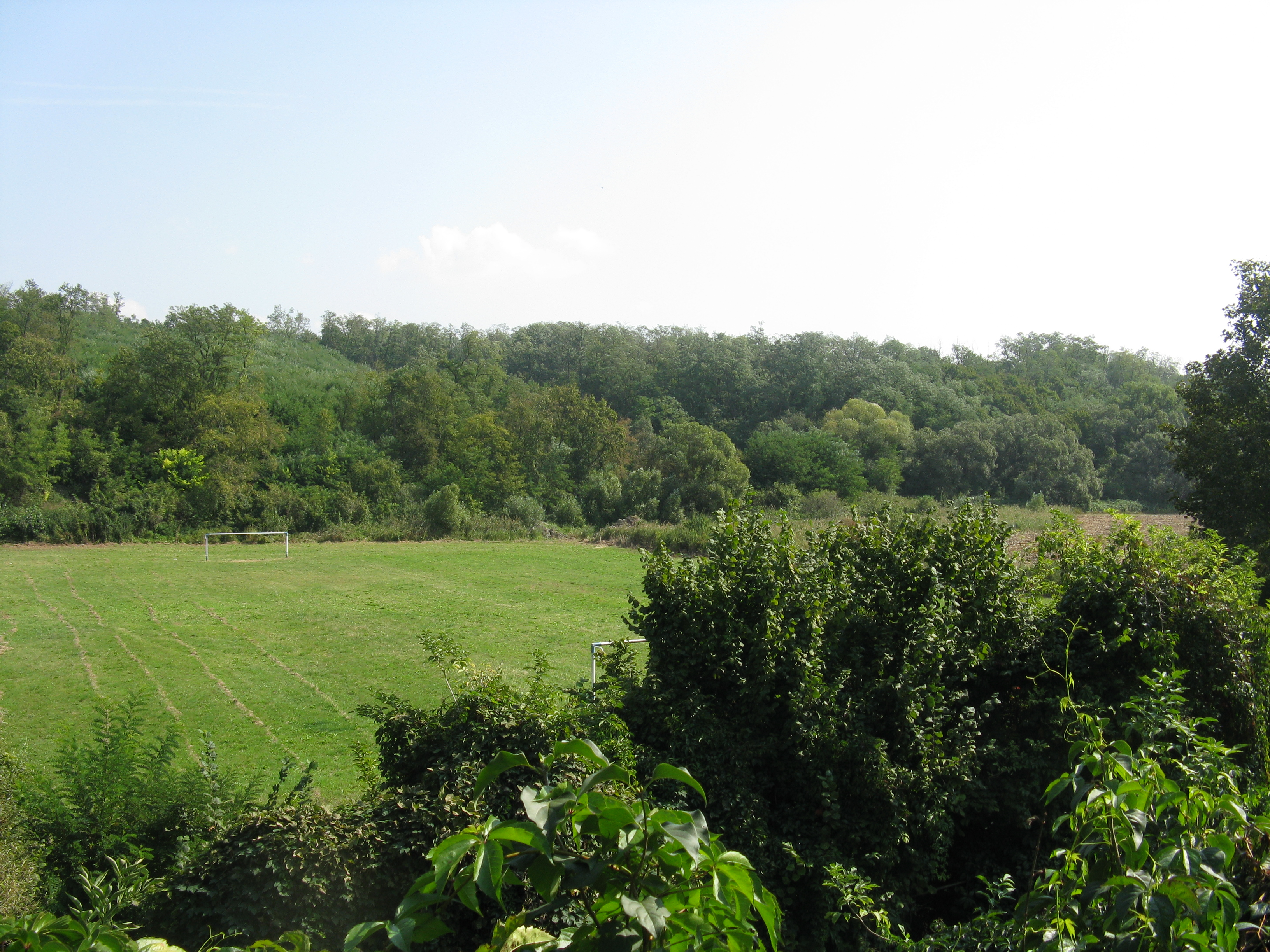 935 02 Brhlovce, Slovakia